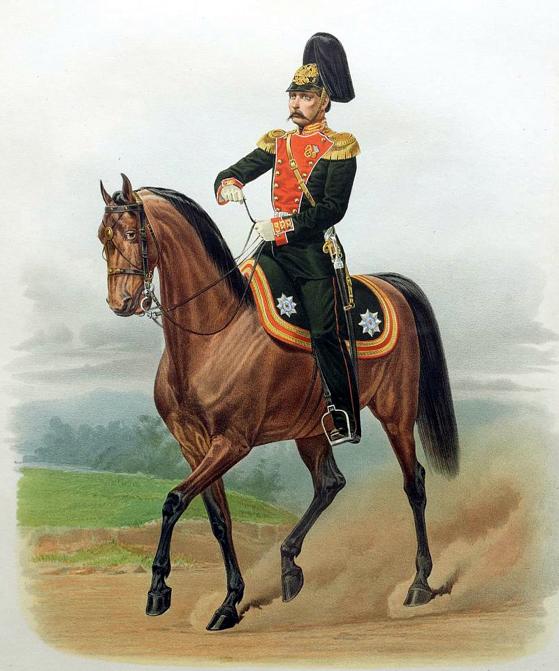 Штаб-Офицер Лейб-гвардии Преображенского полка. (В городской парадной строевой форме) 20 мая 1865 года.